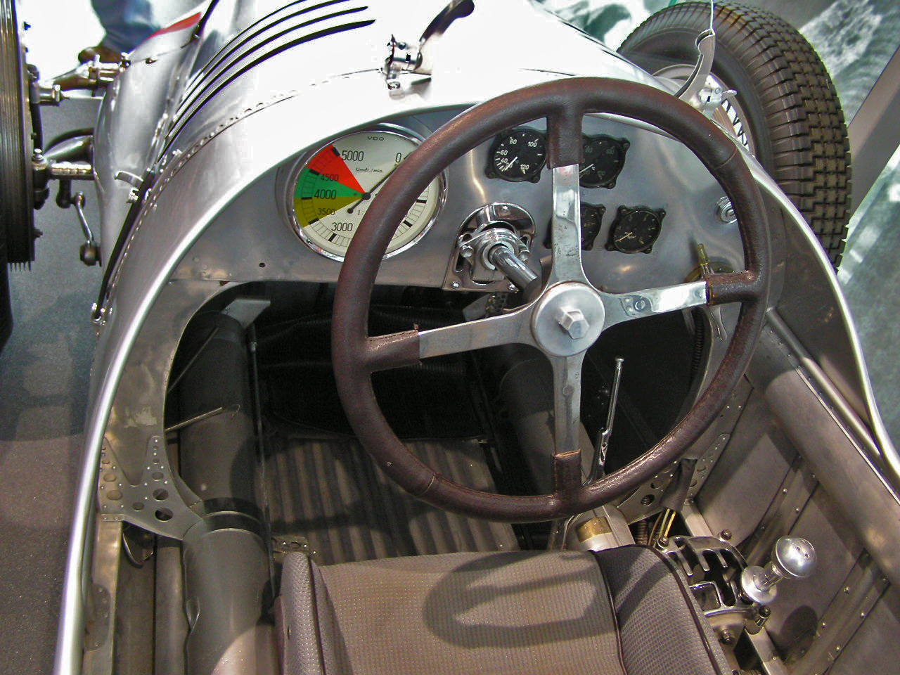 Armaturenbrett des Auto Union Typ D–Bergrennwagen, mit einem 16-Zylinder-Motor des Typs C.